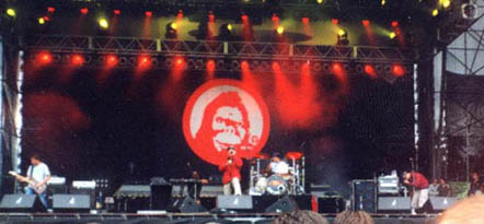 Ein Foto vom Liveauftritt der Band 'A' bei den Hard Pop Days 2000 in Koblenz